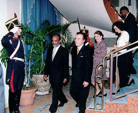 El presidente Carlos Menem ofreció una cena para el presidente de Haití, don René Preval, en el Hotel Alvear Palace.